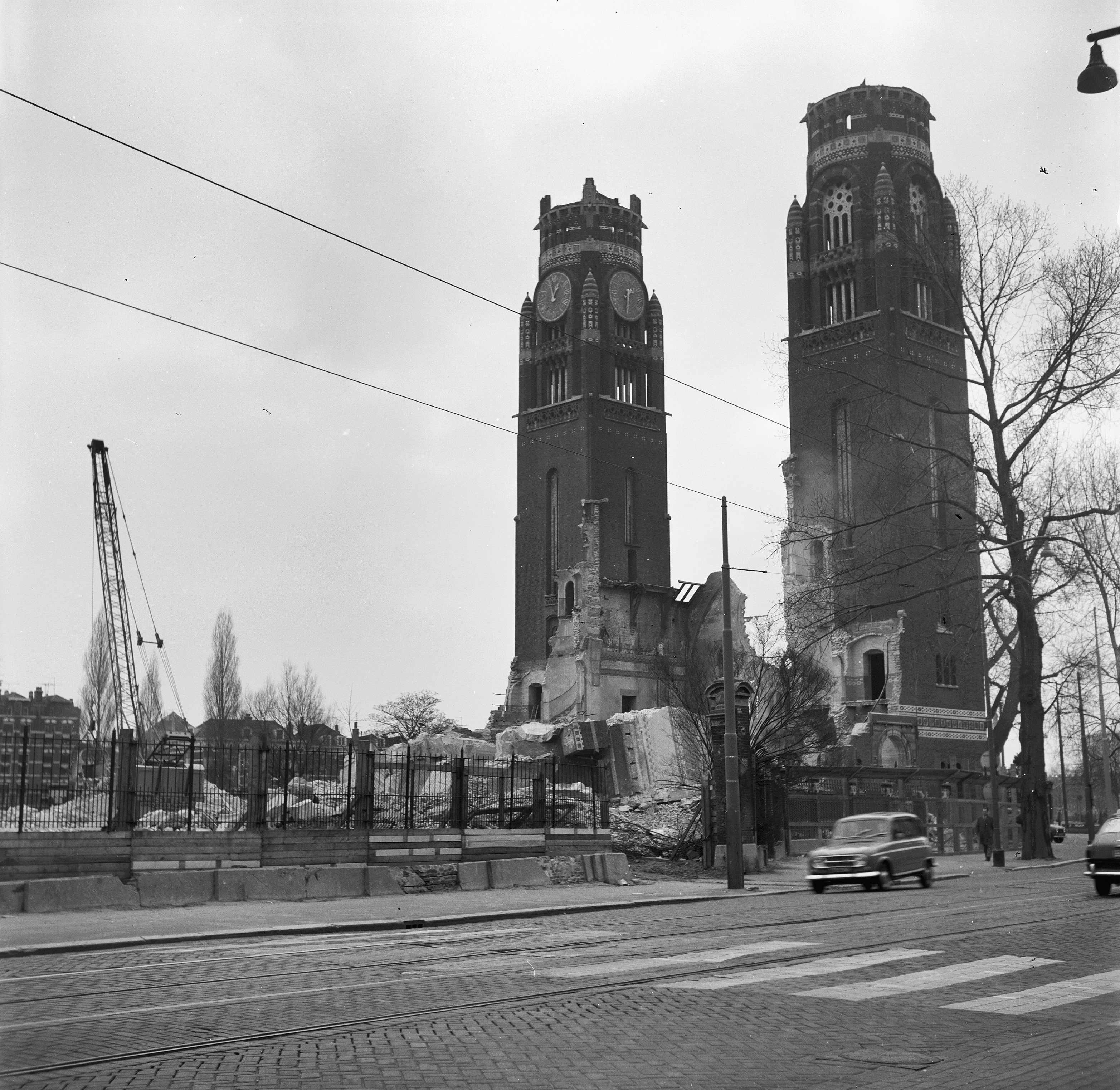 Nederlands Hervormde Koninginne Kerk: exterieur tijdens sloop